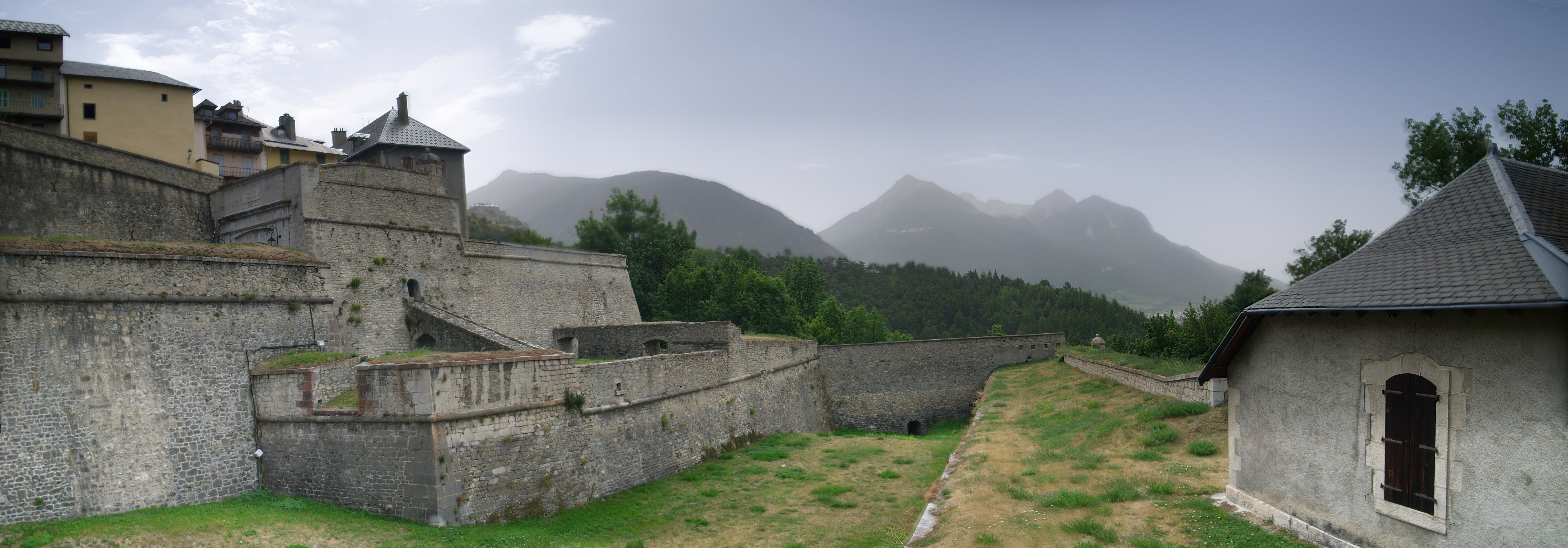 La cittadina di Briançon, Francia - panorami